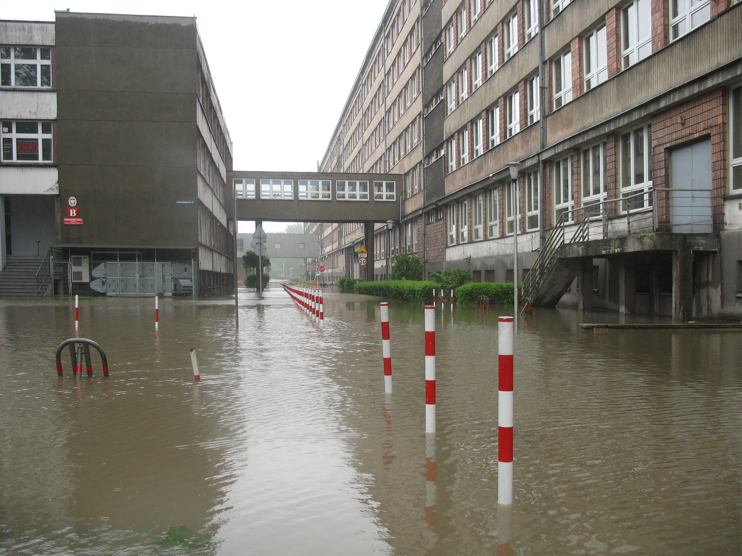 Woda płynaca pomiędzy budynkami Konarskiego 18 i Konarskiego 18b należacymi do Wydziału Mechanicznego Technologicznego Politechniki Śląskiej.